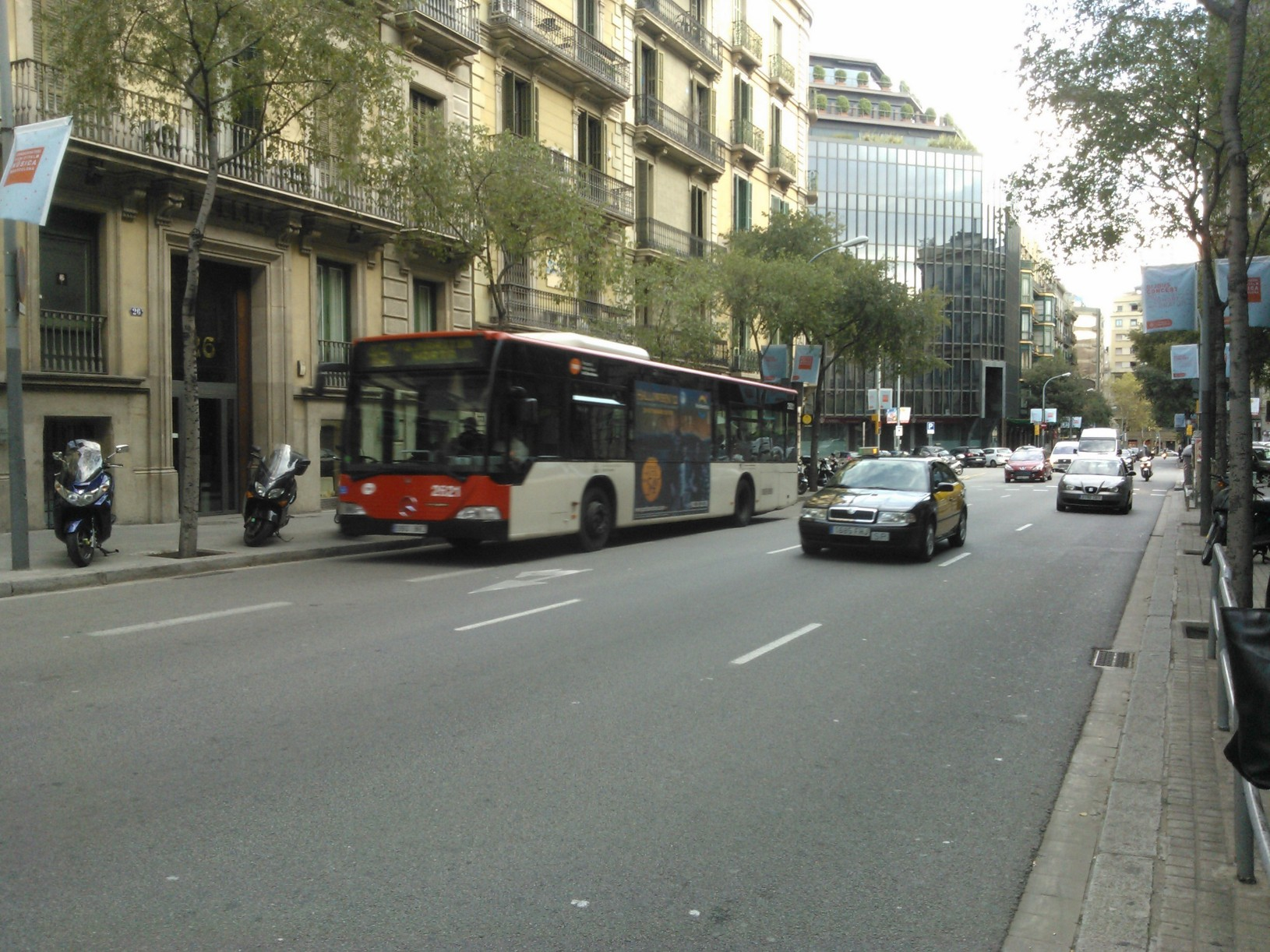 Autobús urbà de Barcelona